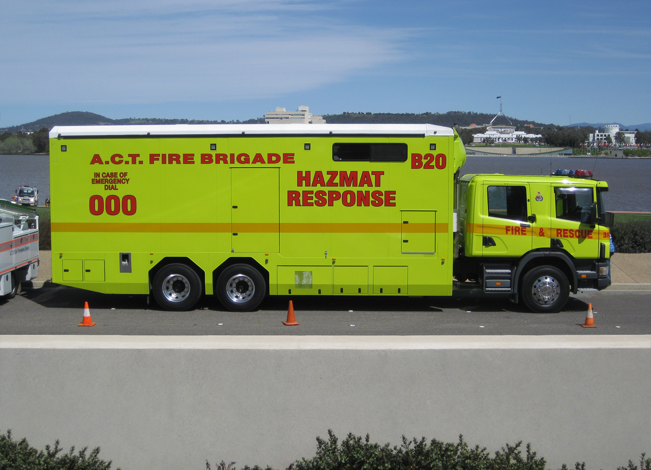 ACT Fire Brigade Scania 94G 300 - Hazardous Materials Response vehicle in Canberra Australia.